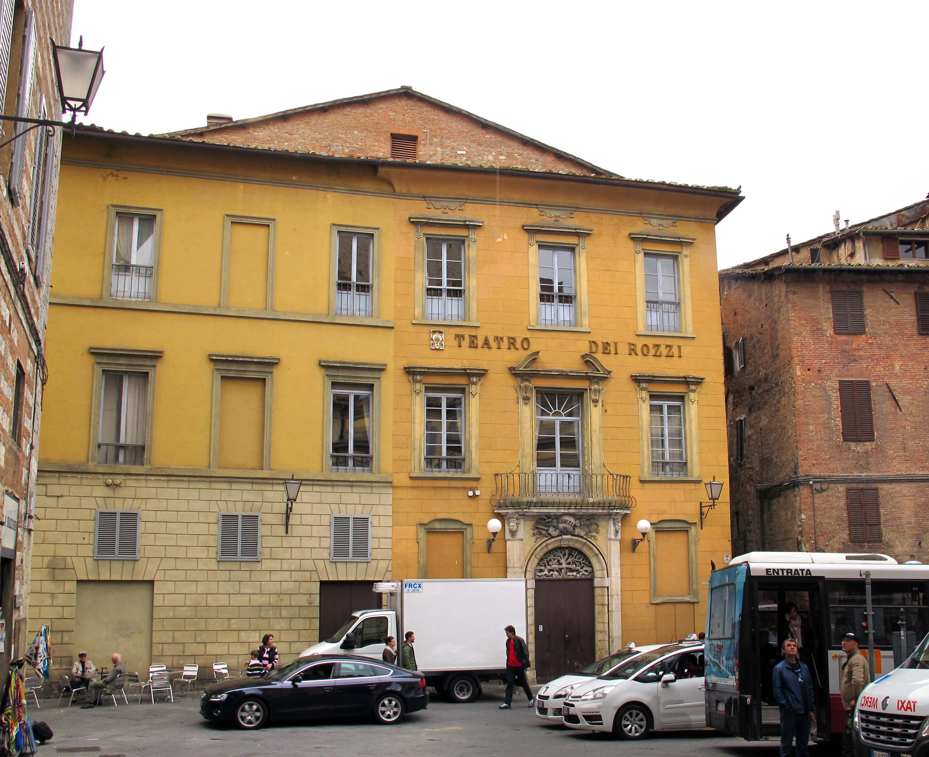 Piazza Indipendenza, Siena